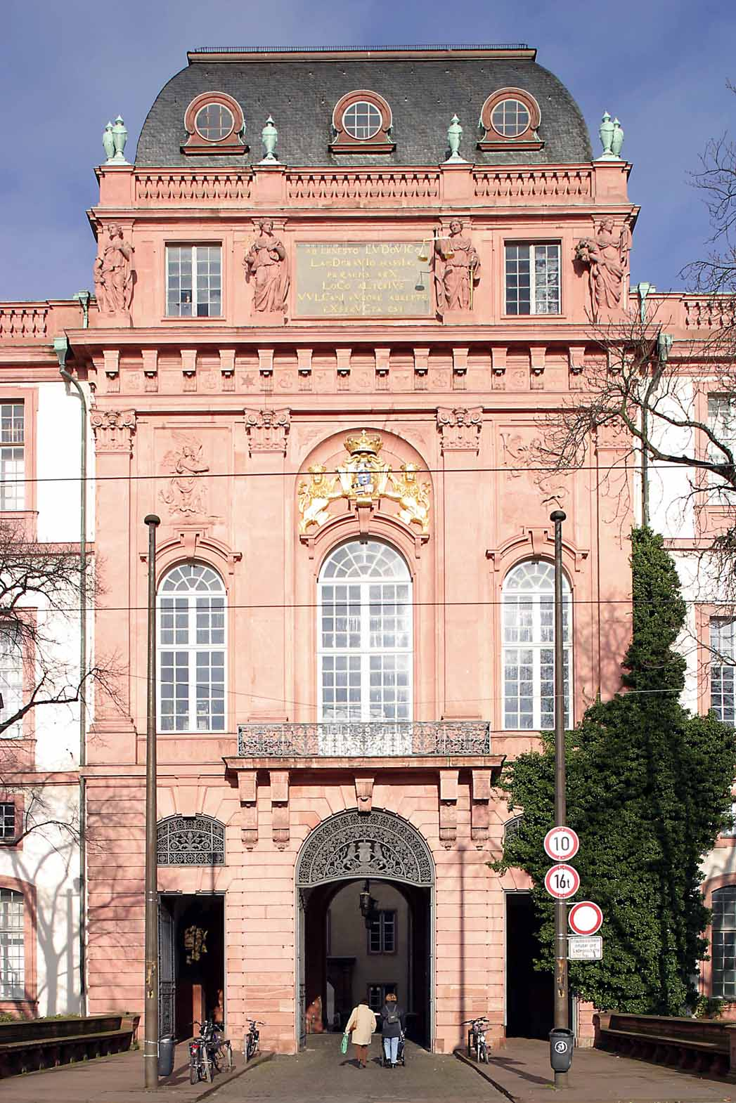 Darmstadt, Residenzschloss Marktseite